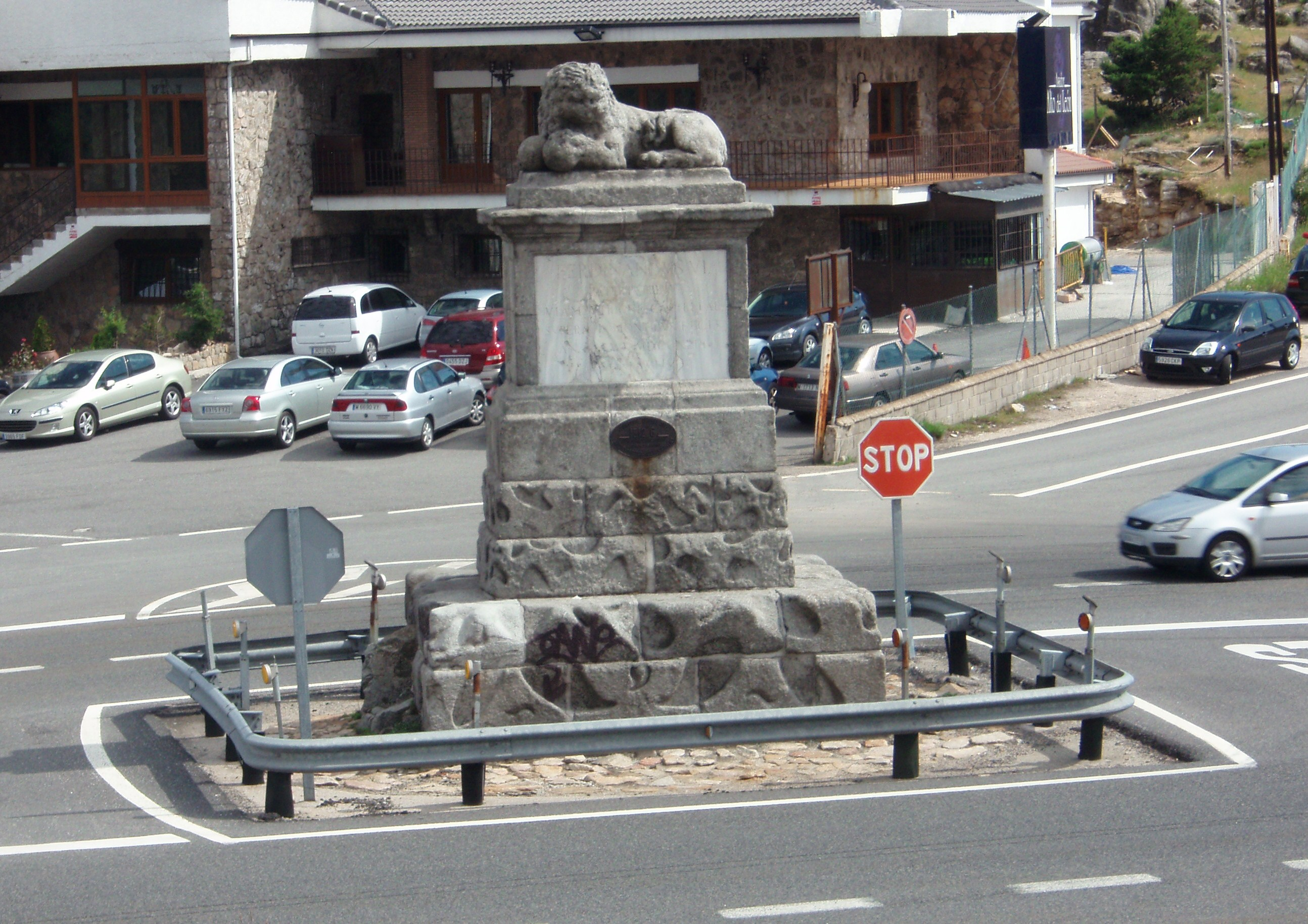 Imagen del León situado en el Puerto de Guadarrama (también denominado Alto de los Leones por dicho monumento) inagurado durante el reinado de Fernando VI de Borbón.